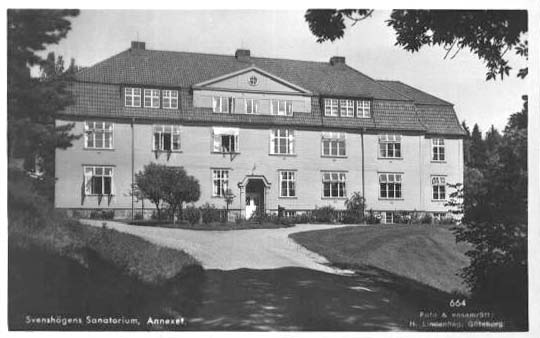 Svenshögens Sanatorium, Annexet